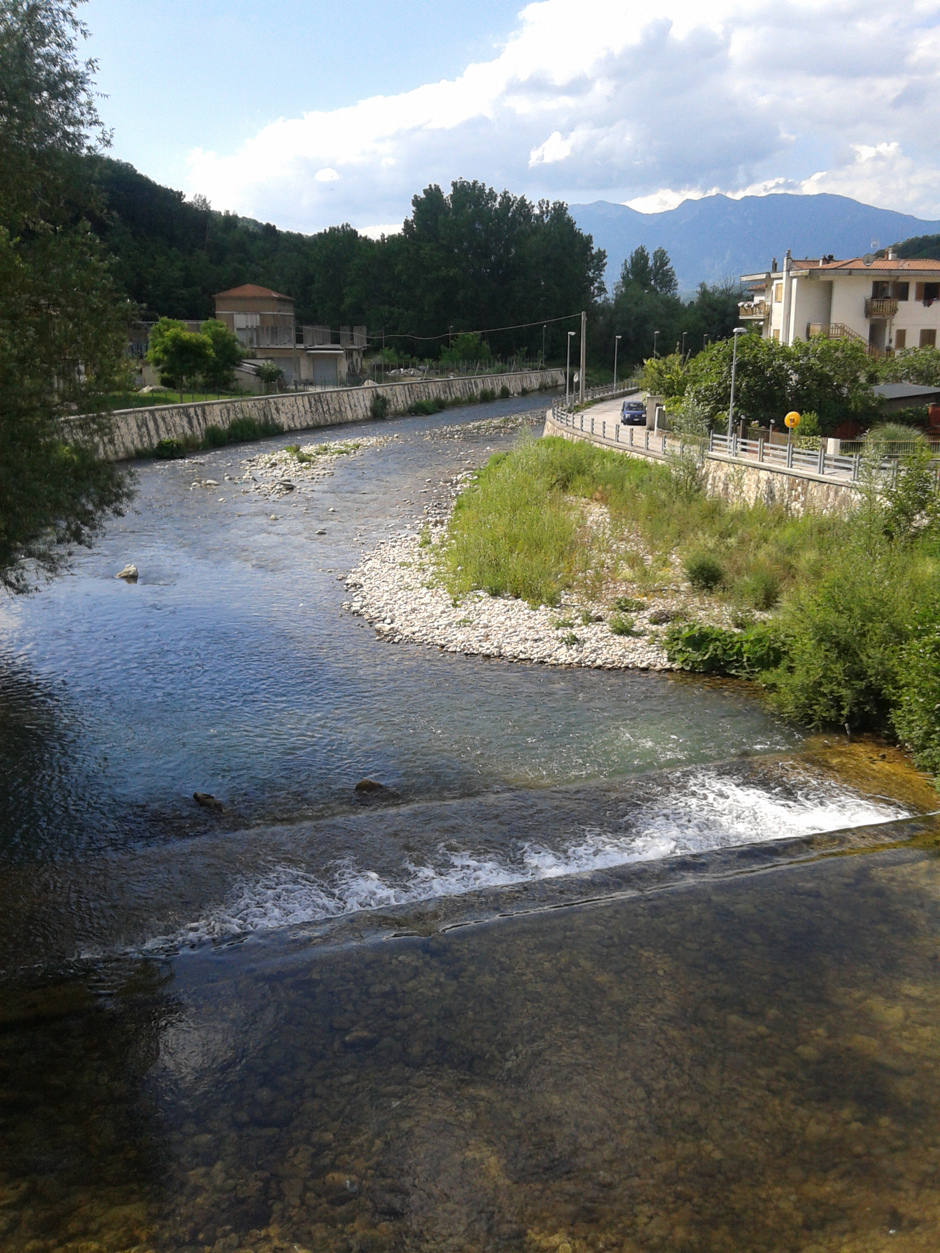 Canistro: foto panoramica dal fiume Liri